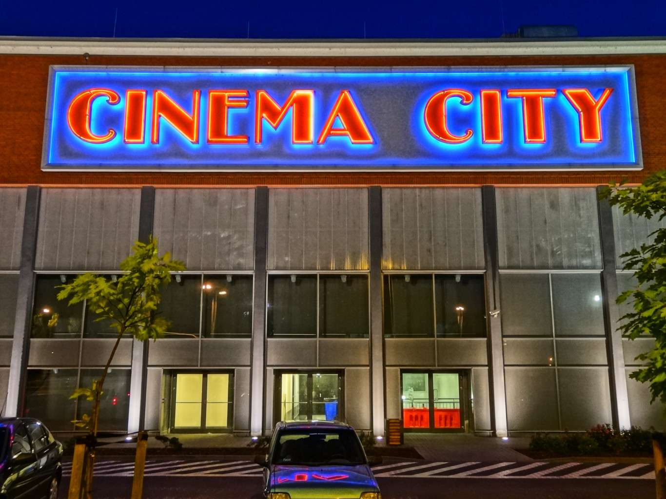 Centrum handlowe Focus Mall w Bydgoszczy przy ulicy Jagiellońskiej; multipleks Cinema City